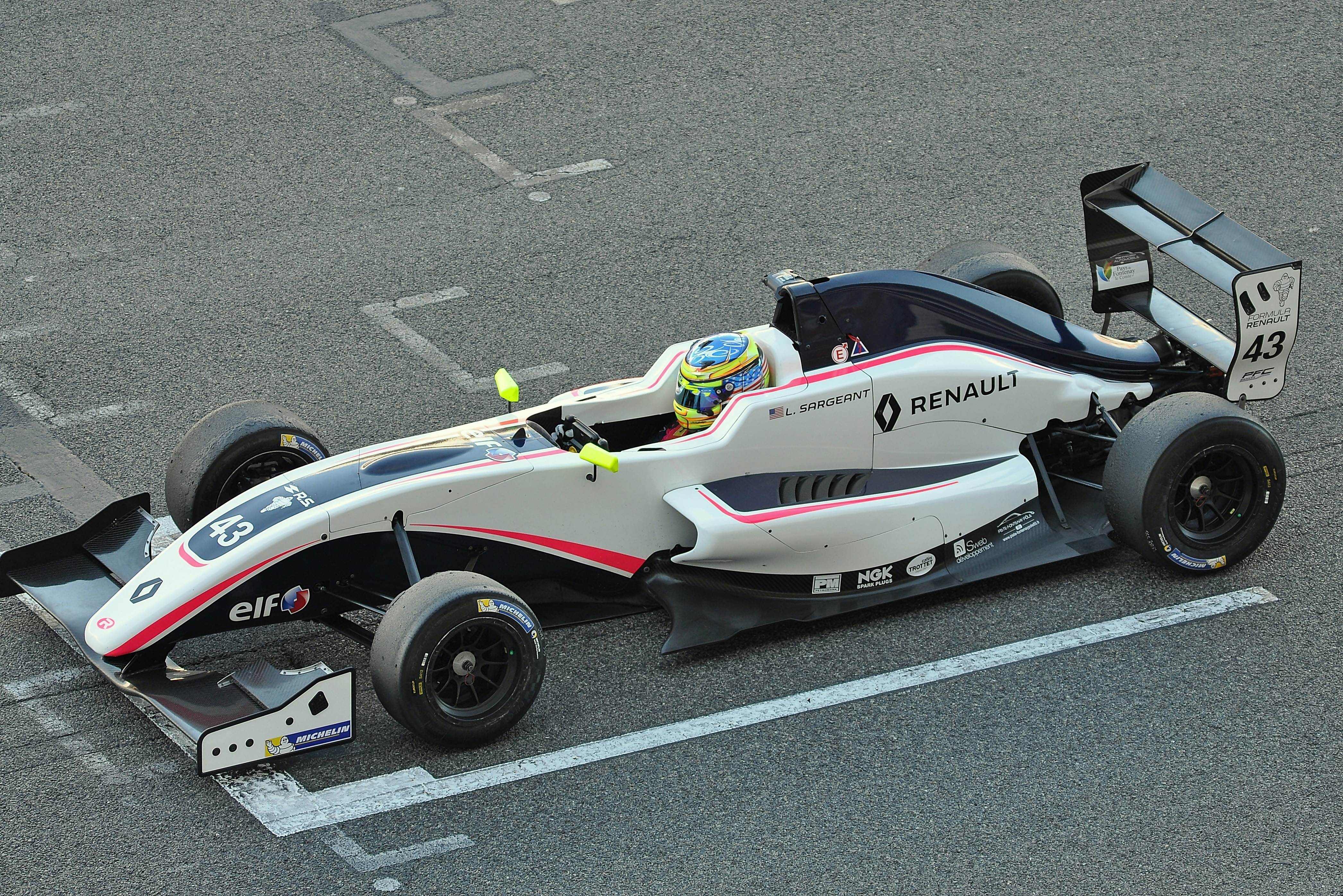 Circuito de Barcelona 2017